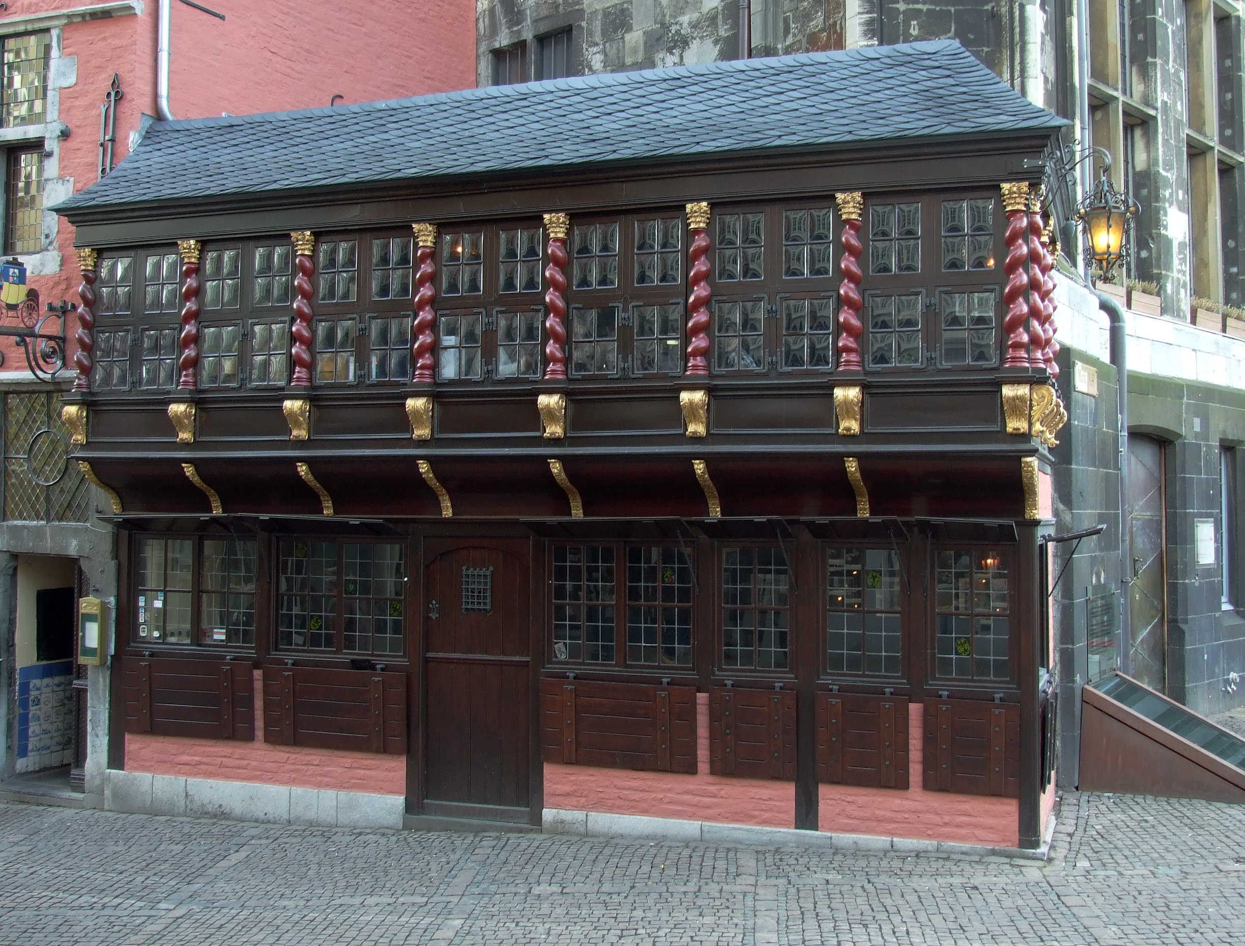 Postwagen am Aachener Rathaus